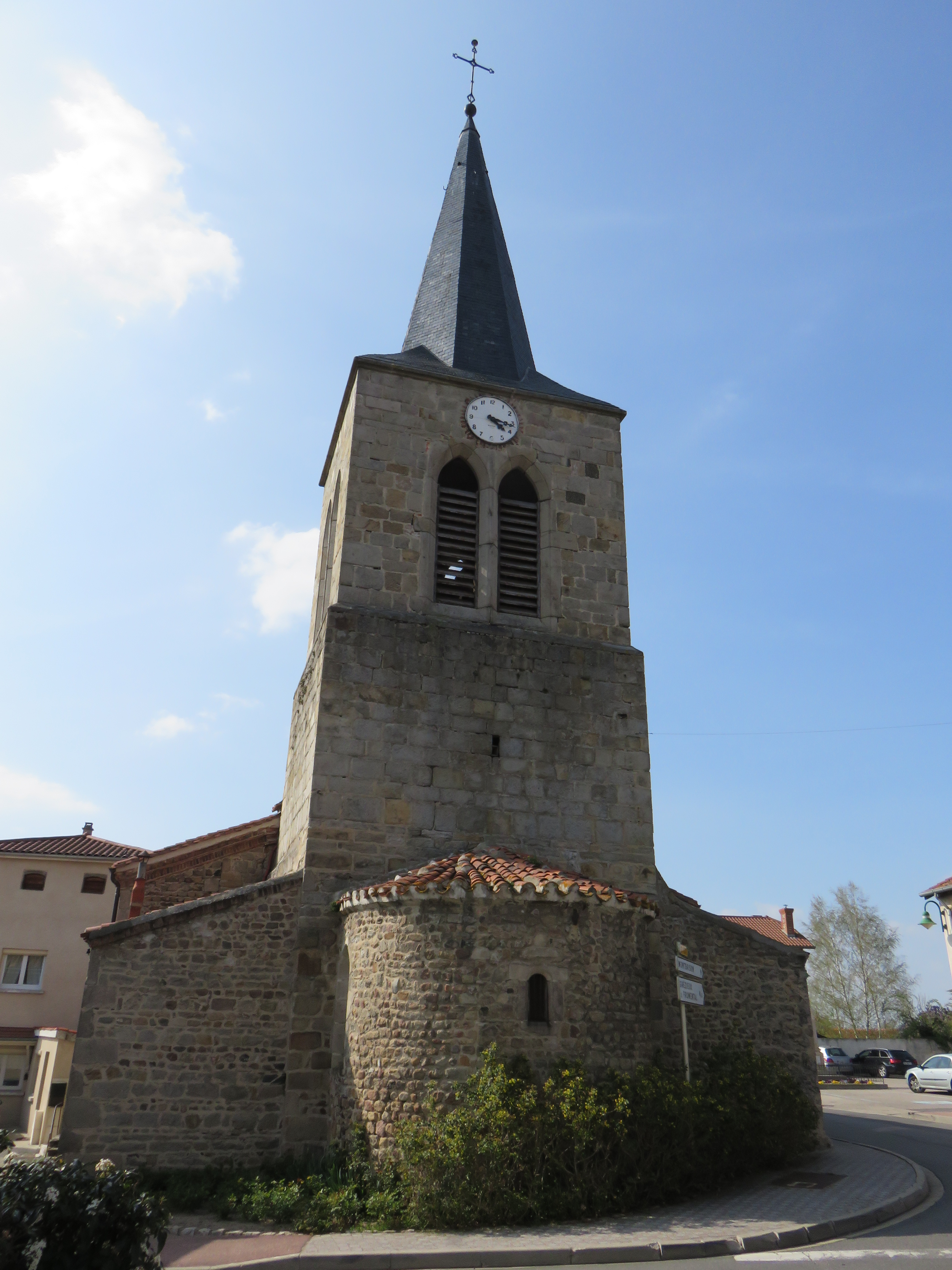 Le clocher de l'église Saint-Symphorien à Précieux (Loire, France).